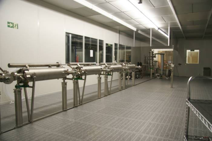 Reinraum von DESY in Hamburg; der Reinraum (teilweise Klasse 10, teilweise Klasse 100) wird genutzt um die Kavitäten zu reinigen und zusammenzubauen'; zu sehen sind vier Kavitäten, die zusammengebaut wurden. Veröffentlichung mit freundlicher Genehmigung DESY, Hamburg.